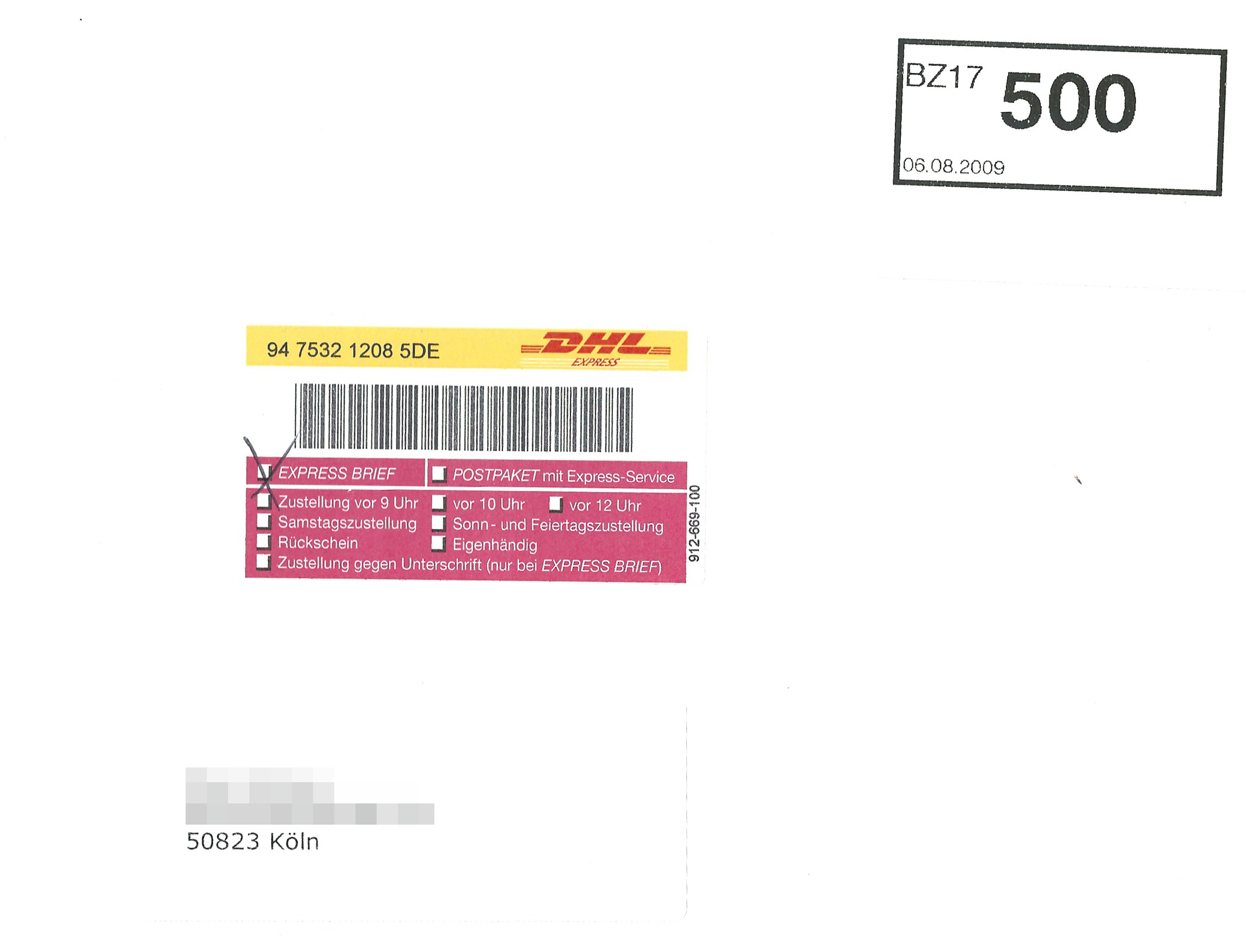 Express-Brief Deutschland via DHL